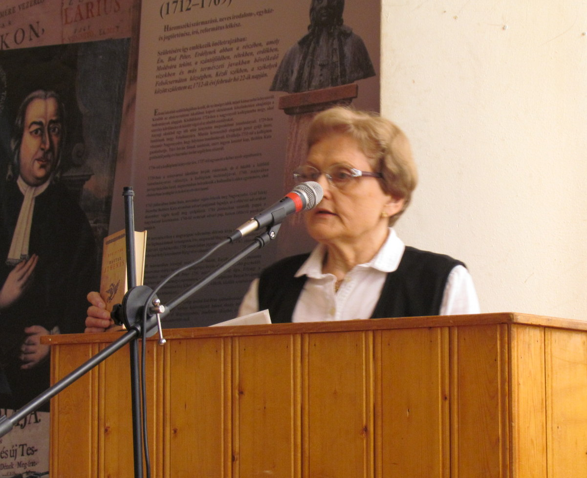 Nagyenyedi konferencia